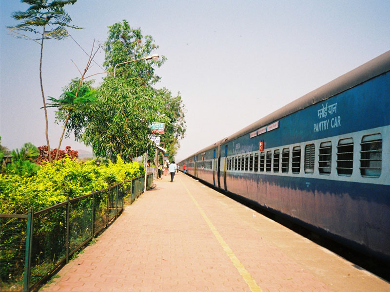 മംഗള ലക്ഷദ്വീപ് എക്സ്പ്രസ് കൊങ്കൺ പാതയിലെ രത്നഗിരി റെയിൽവേ സ്റ്റേഷനിൽ.